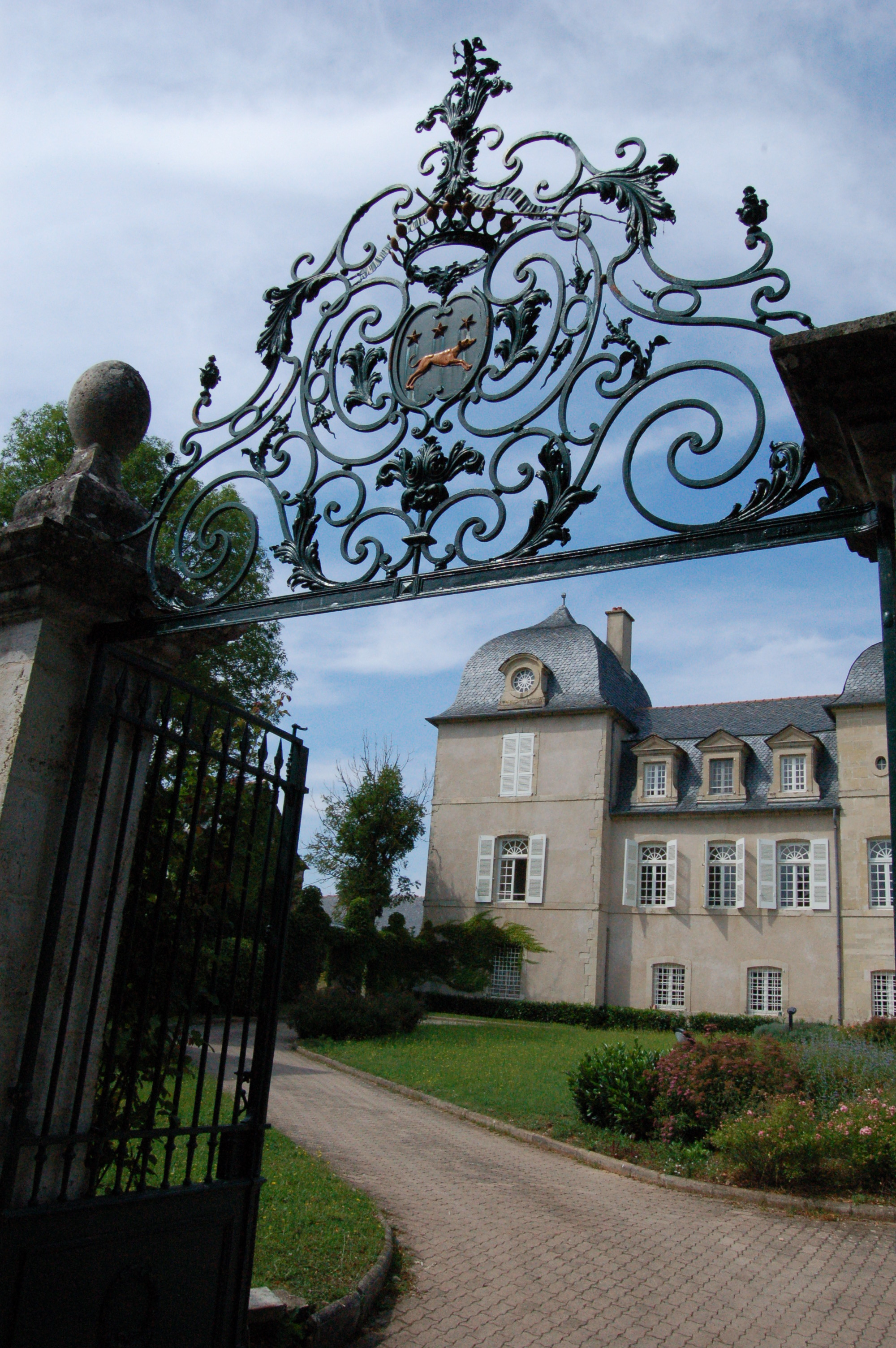 Grille du château de Floyrac, Onet-le-Château, Aveyron (12), France